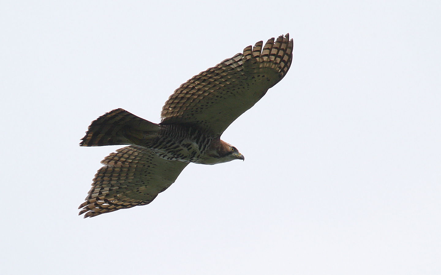 Ornate Hawk Eagle -- Parque Nacional Darién, Panama -- 2008 February